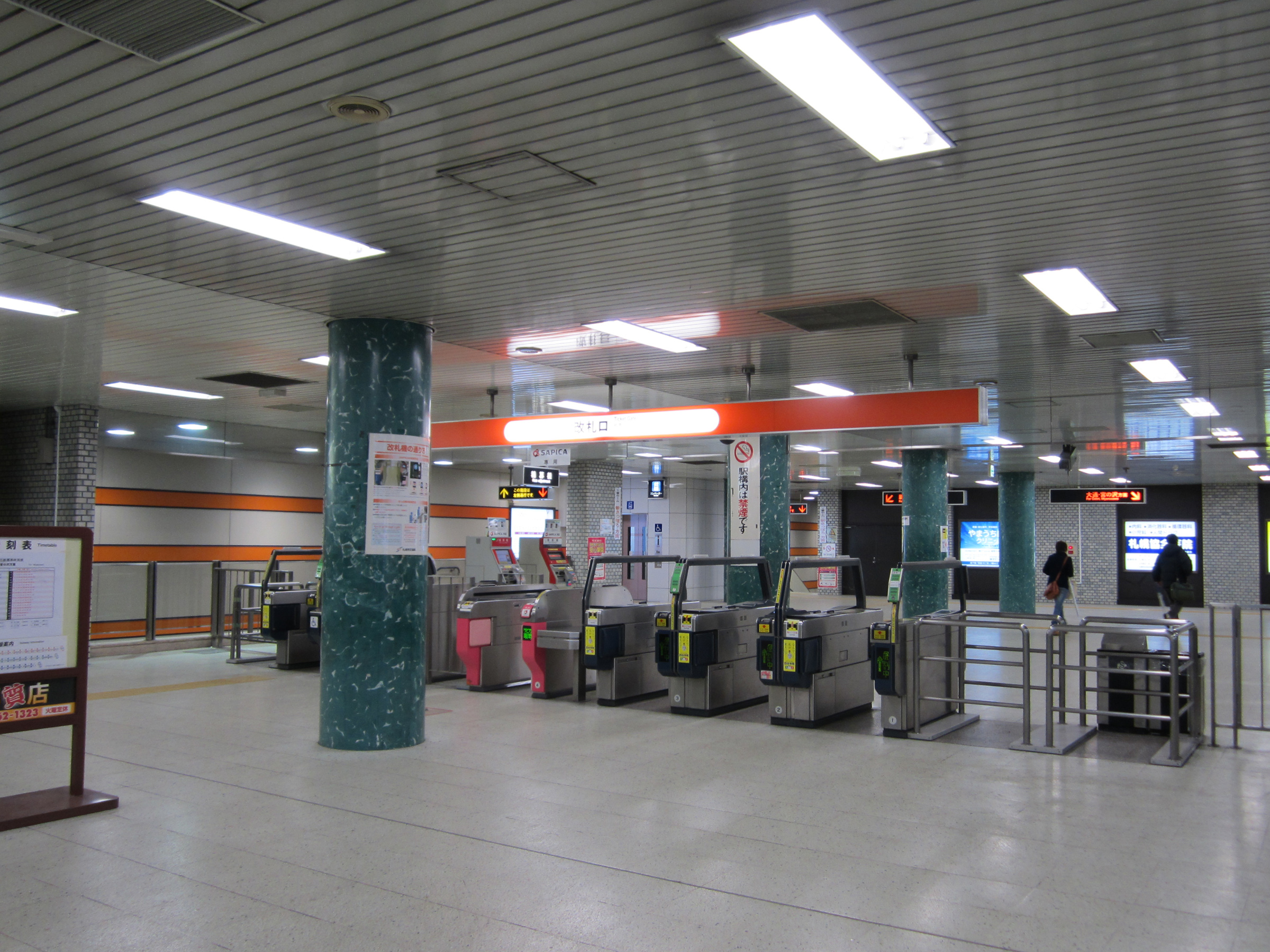 南郷18丁目駅改札口（北海道札幌市白石区）